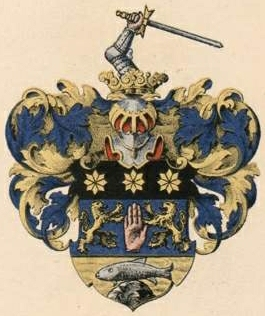 De la Barre suguvõsa aadlivapp